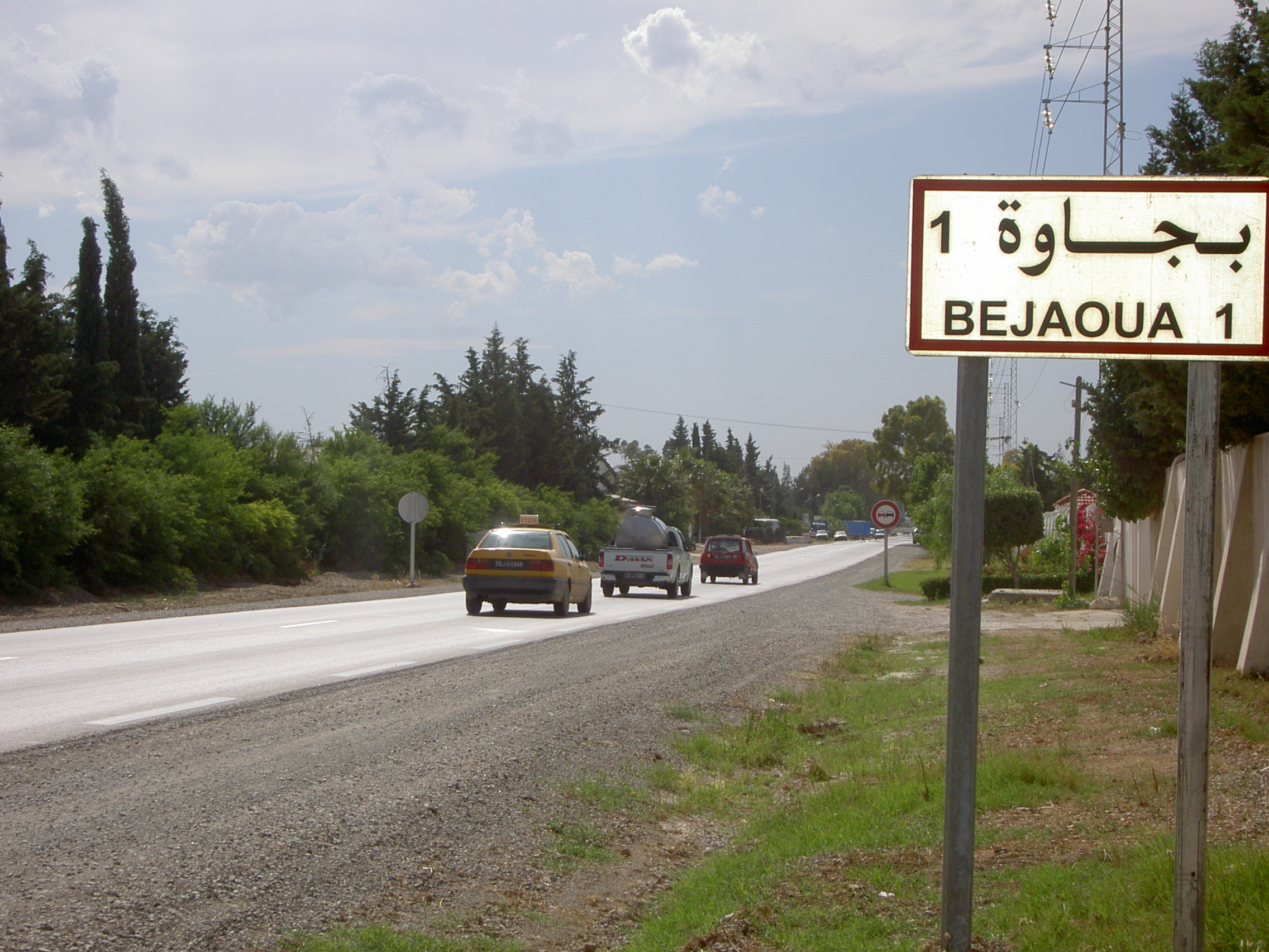 Bejaoua, Tunisia (Route nationale n°7)